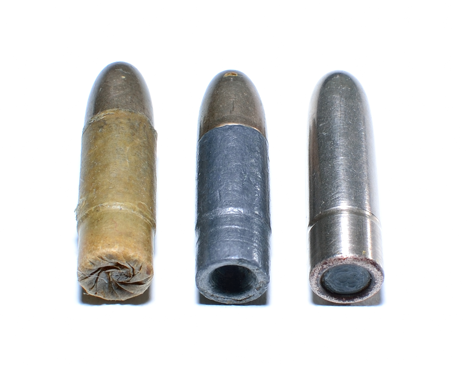 GP90 et GP 90/23